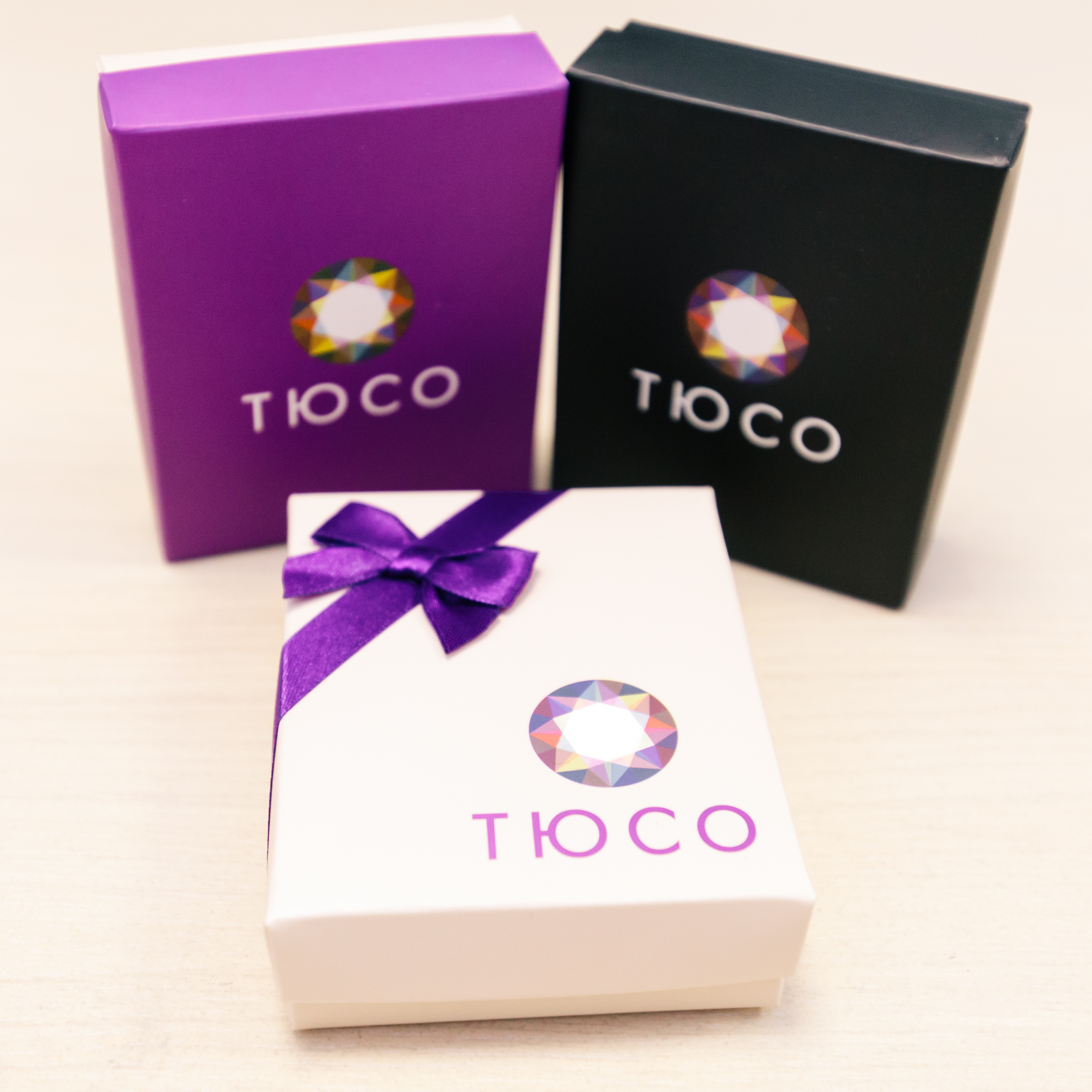 Упаковочные коробки ТЮСО после ребрендинга (2016 год)